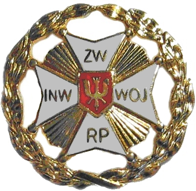 Odznaka ZIW